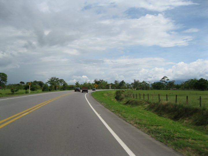 Ruta Nacional 65 entre Villavicencio y Acacías (Meta)